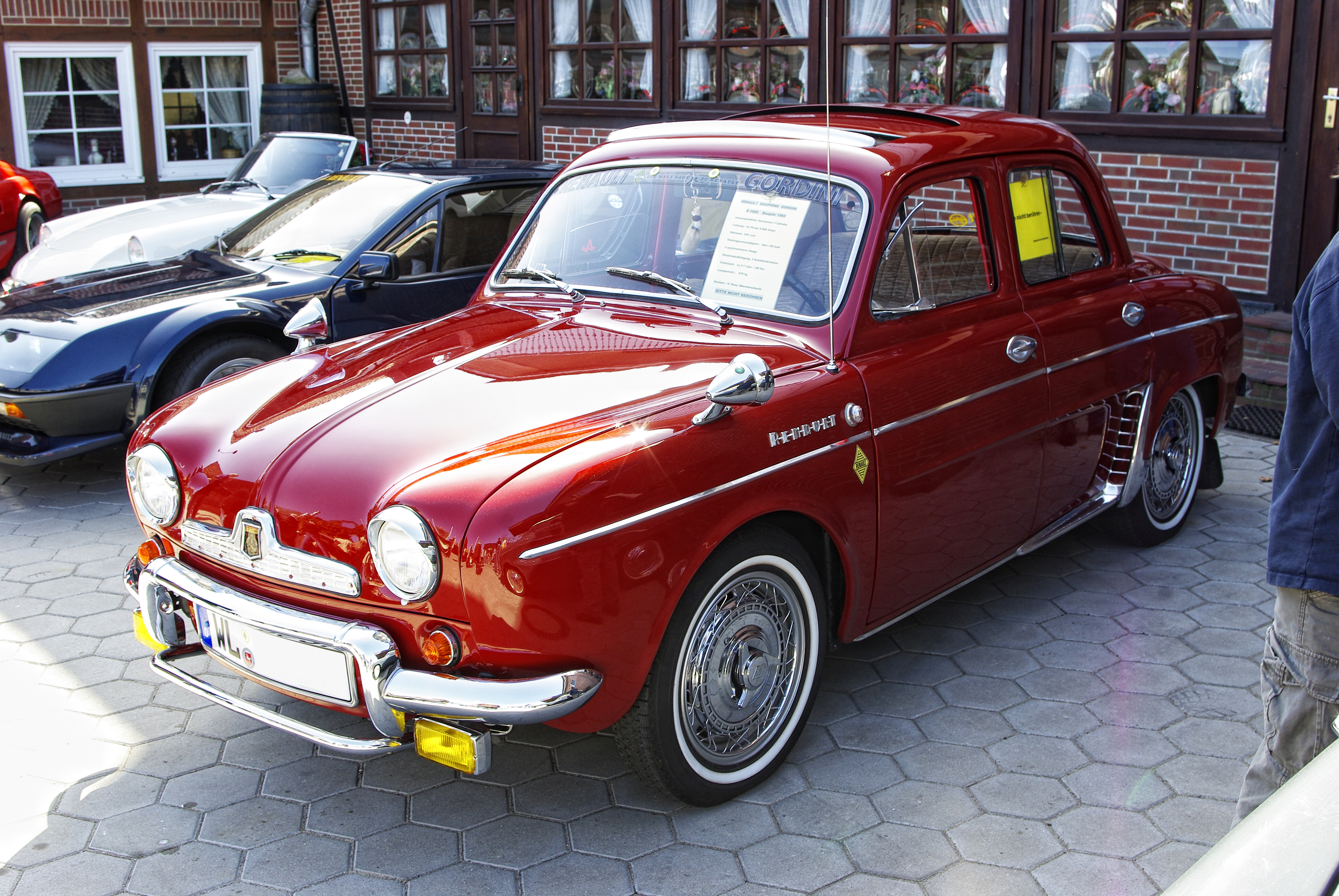 1965 Renault Dauphine R1095 Gordini